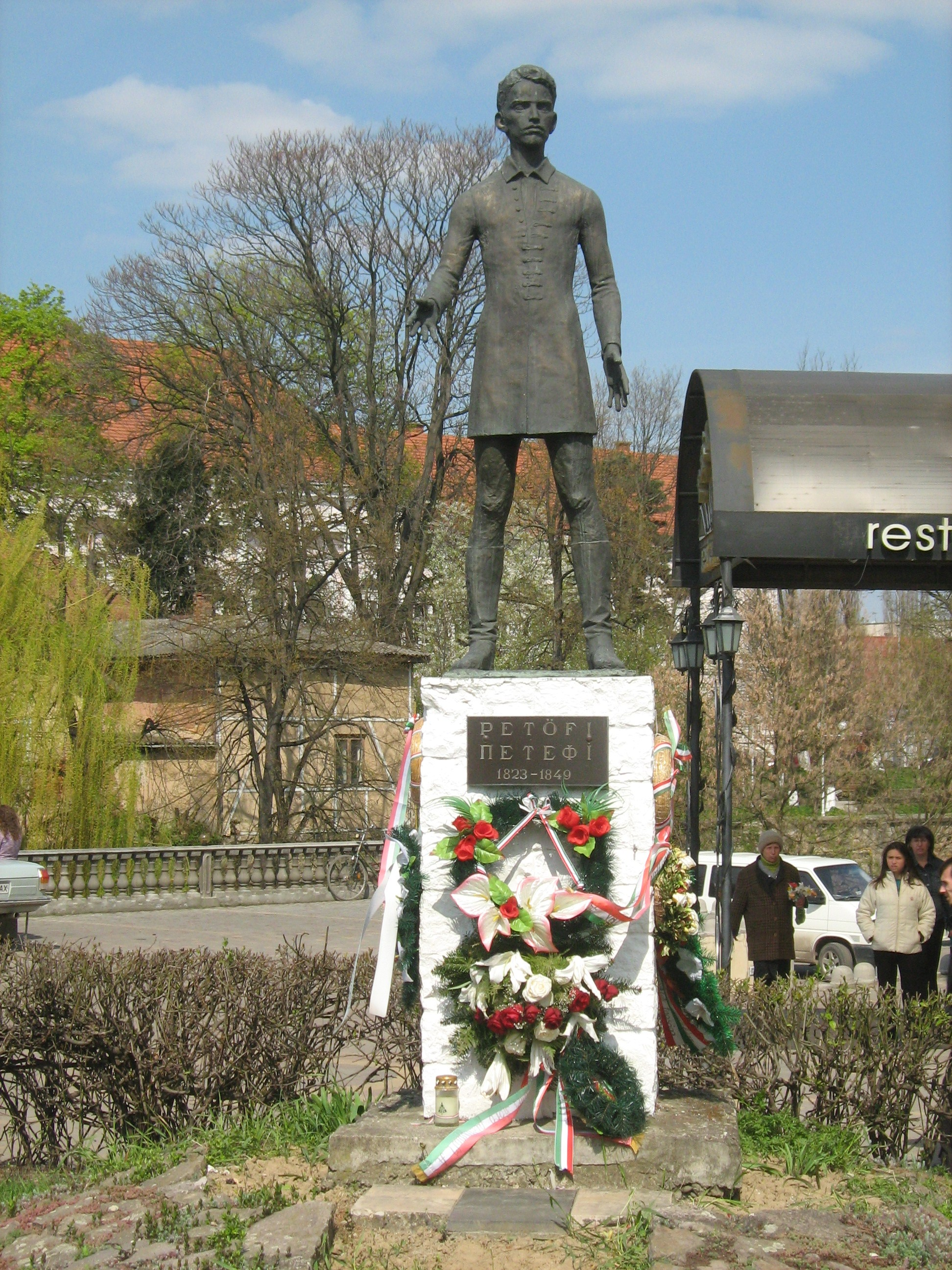 Памятник венгерскому поэту Шандору Петёфи в г.Берегово (Закарпатье)